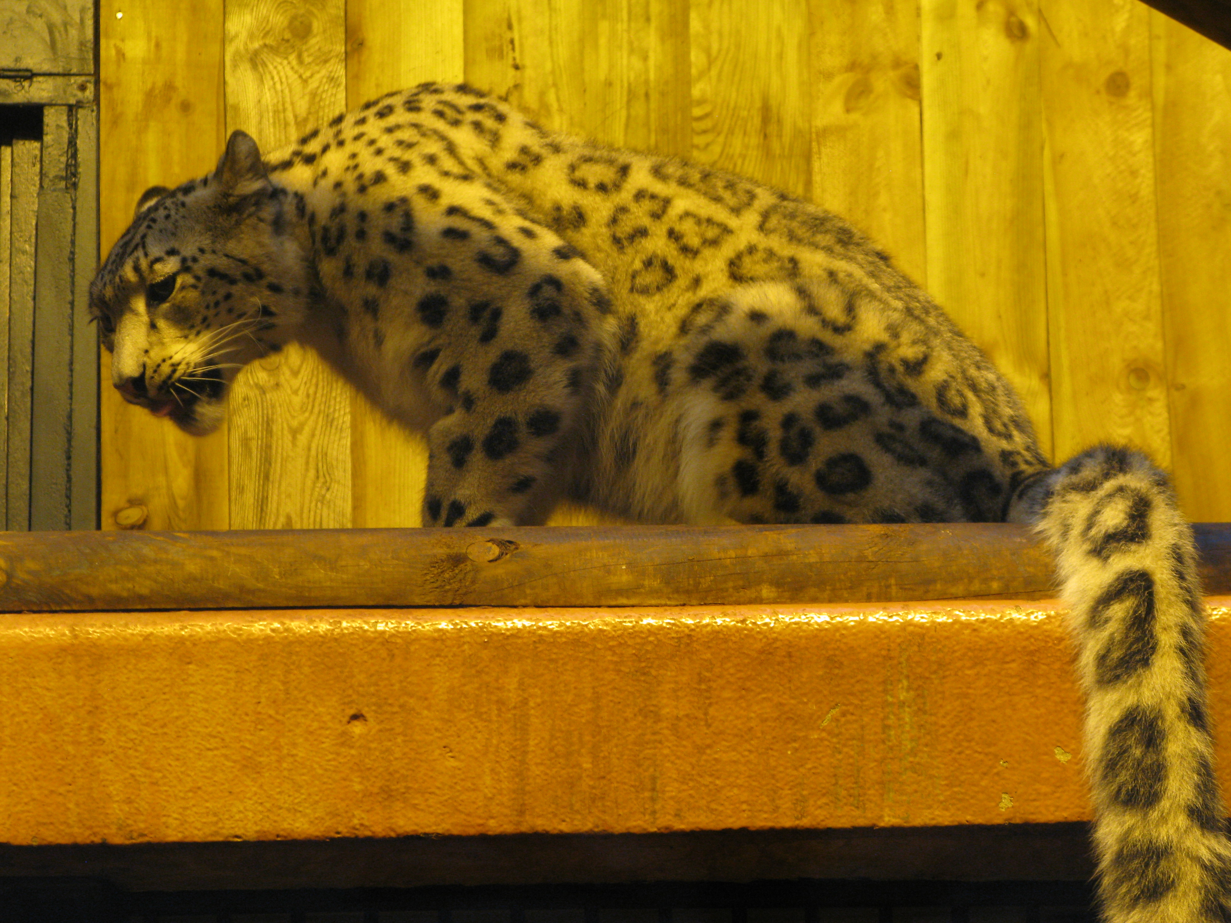 Panthère des neiges (panthera uncia), ménagerie du Jardin des Plantes de Paris.